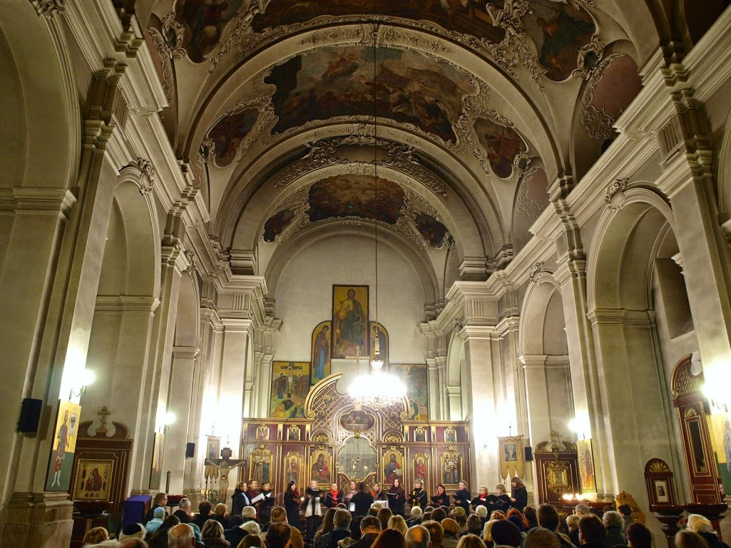 Koncert sboru Philokallia v pravoslavném chrámu svatých Cyrila a Metoděje v Praze